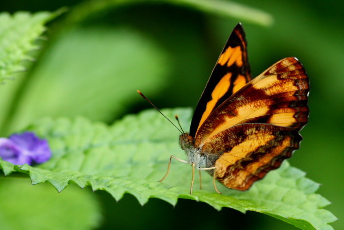 COMMON LASCAR Pantoporia hordonia